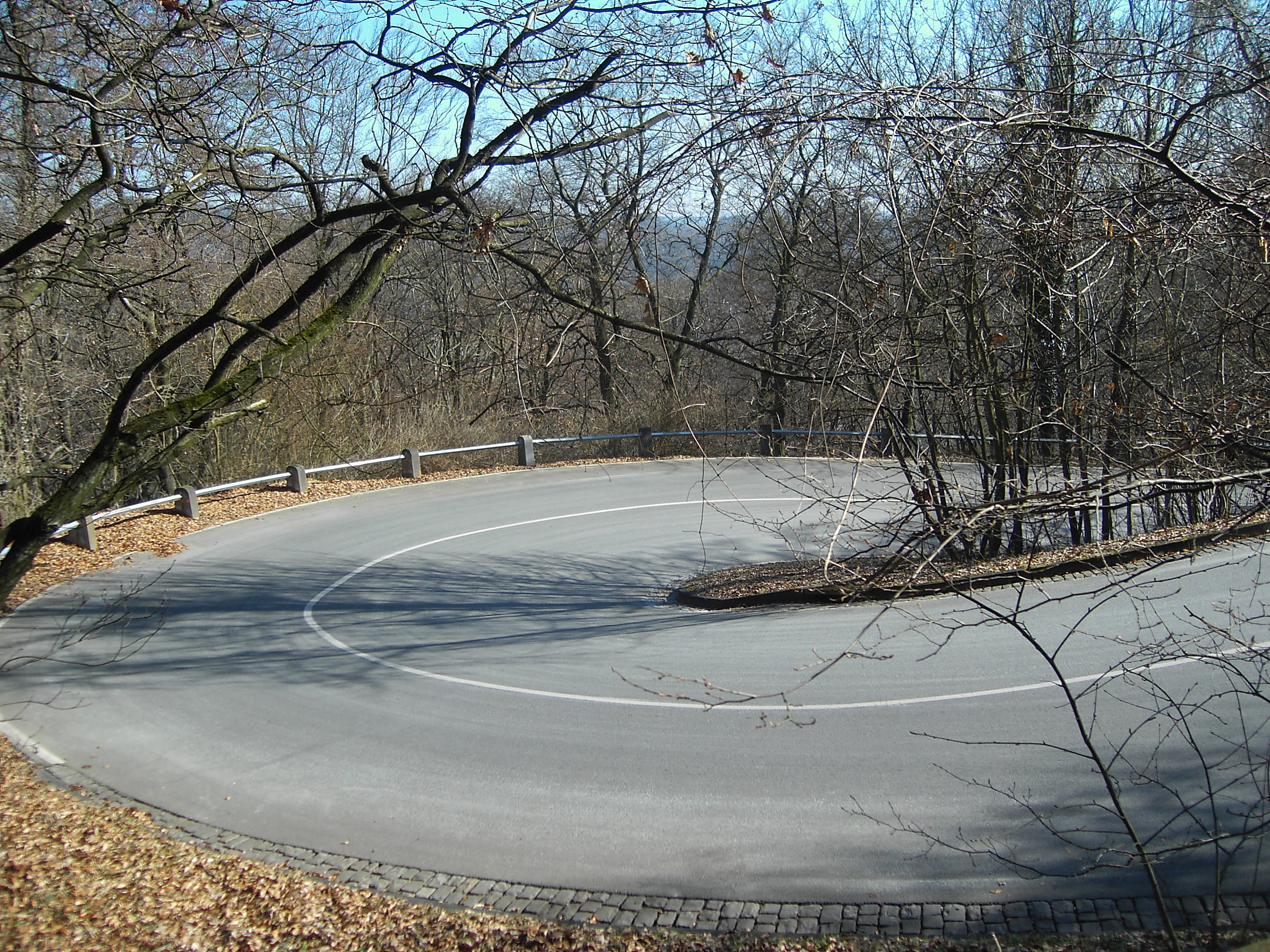 Zufahrtsstraße zum Gästehaus auf dem Petersberg bei Bonn